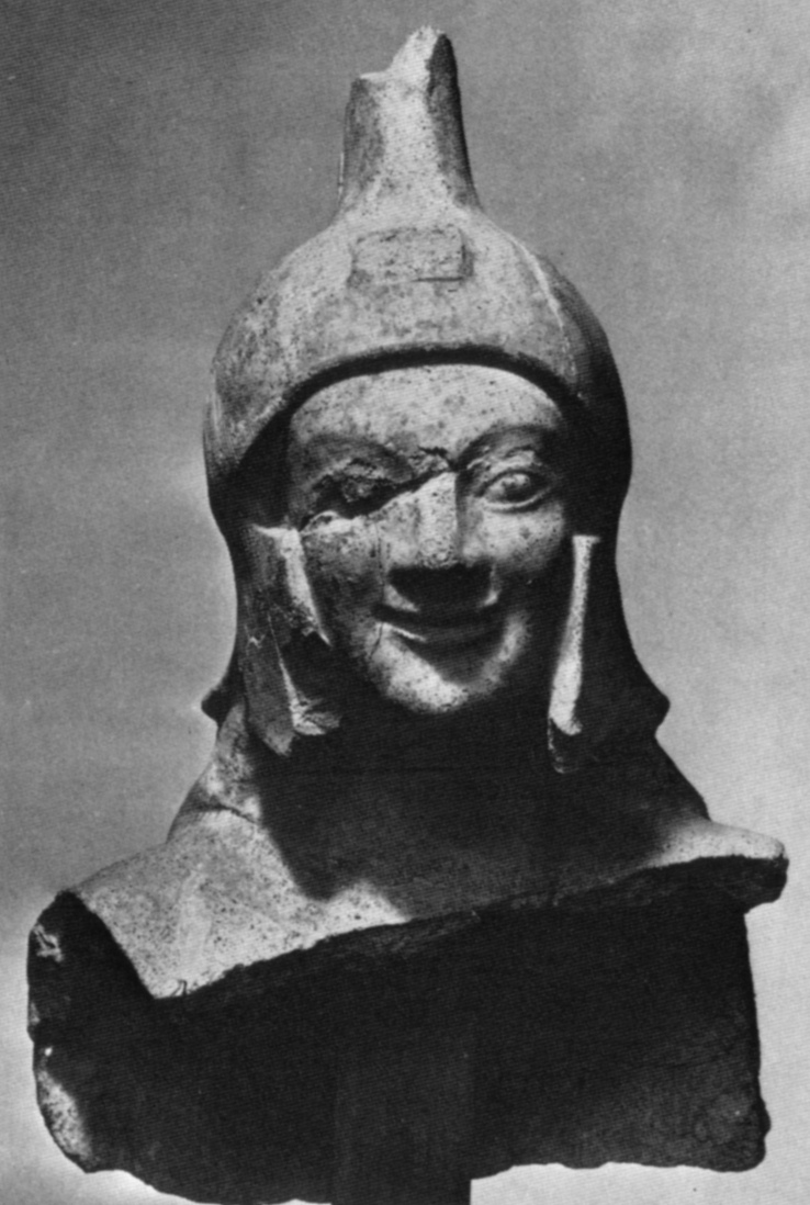 terre cuite architecturale découverte dans l'aire de Sant'Omobono, buste d'Athena ou de Minerve. VIe siècle av. J.-C.